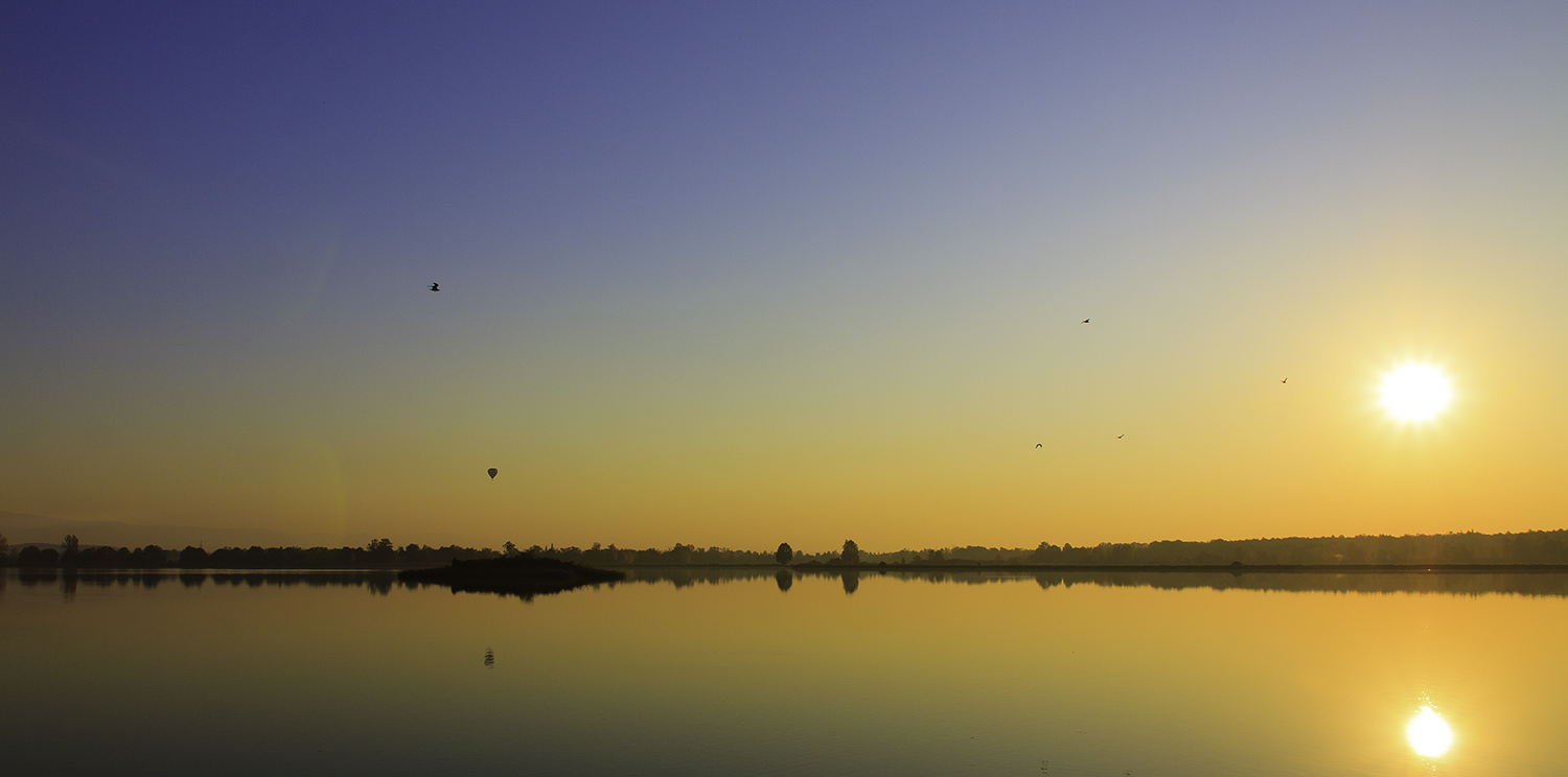 zachód słońca Goczałkowice Zdrój.